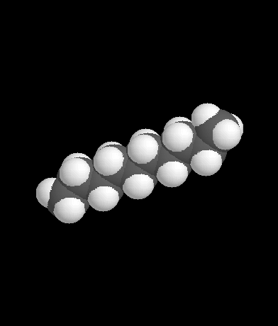 Raumfüllendes Molekülmodell des Dekan